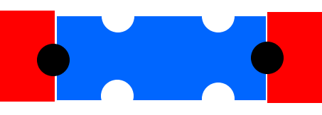 אנו רואים את את כל האנזים במצב הרגיל לפני אקטיבציה כאשר היחדות האדמות מיצגות את היחידו הקטליטיות והגוף הכחול מייצג את אתרי הקשירה cyclic AMPל